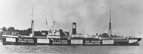 BM Rio Tercero